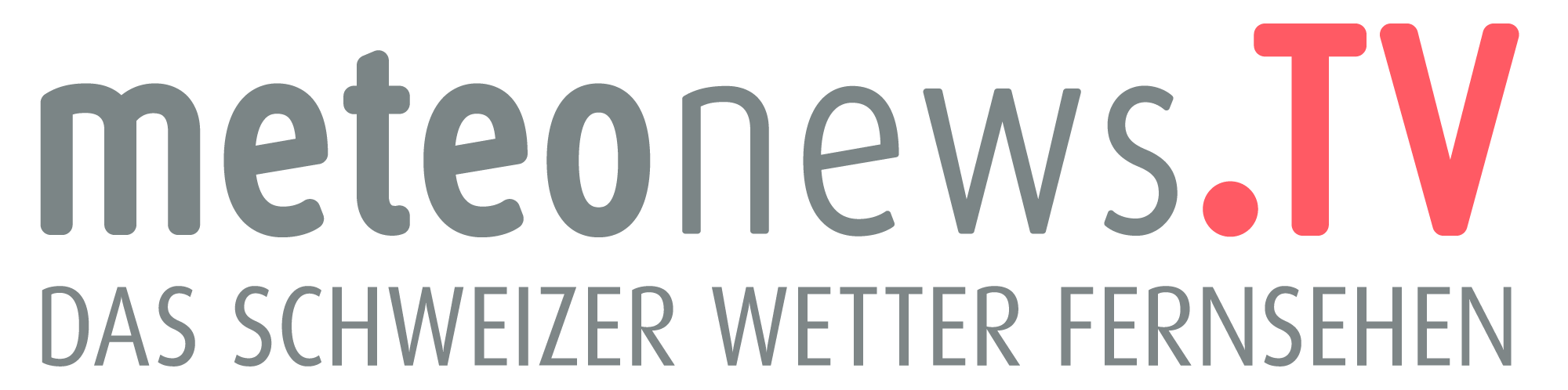 Meteonews.TV Logo mit Claim